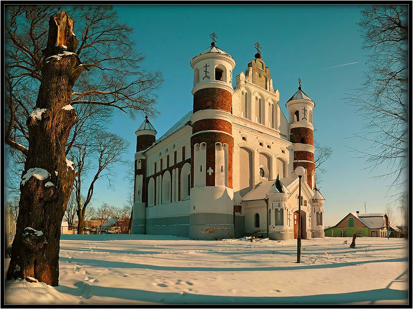 Сьвята-Раства-Багародзіцкая царква(крэпасьць абарончага тыпу)